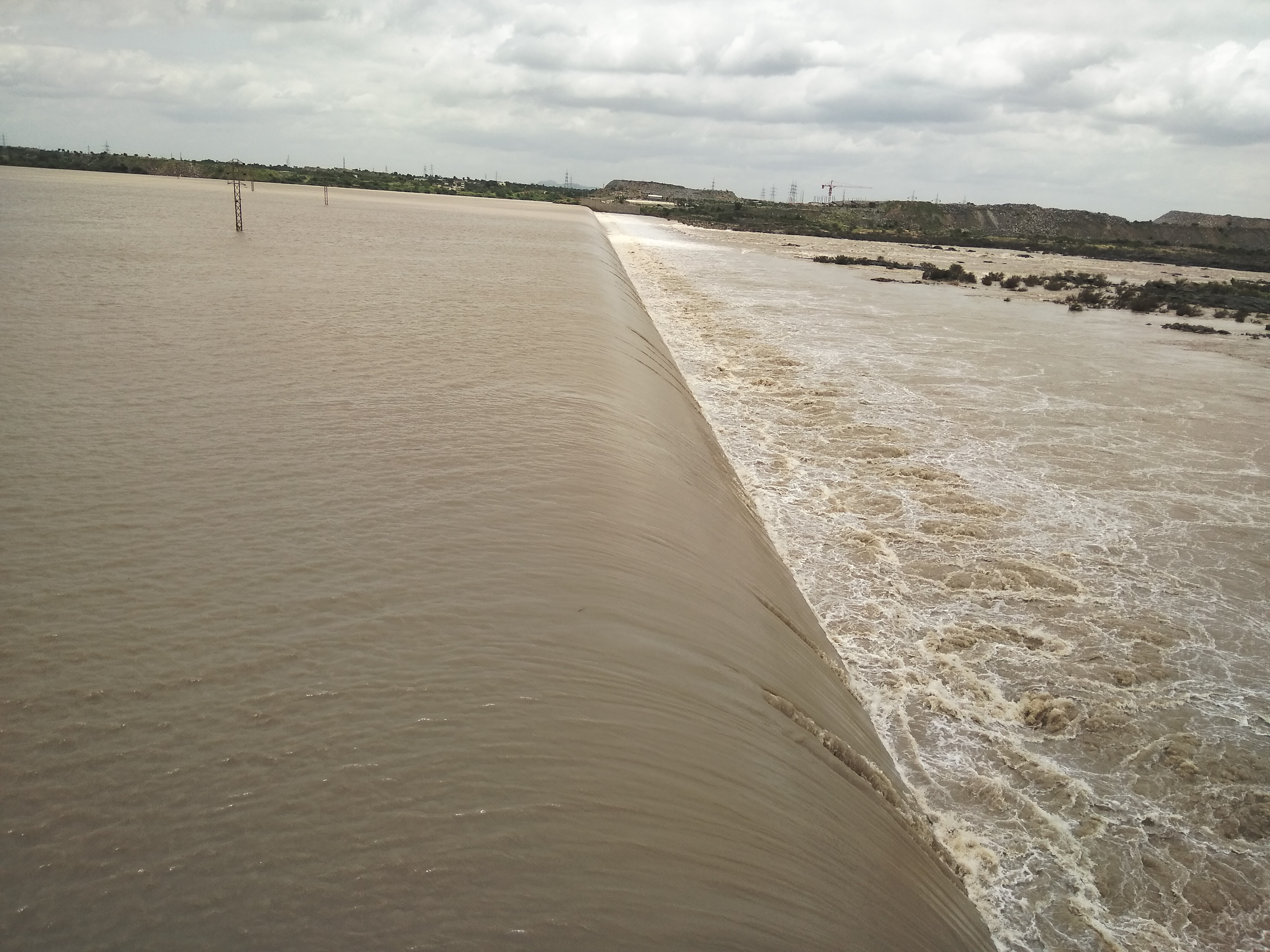 దిగువ జూరాల వద్ద కృష్ణా ప్రవాహం